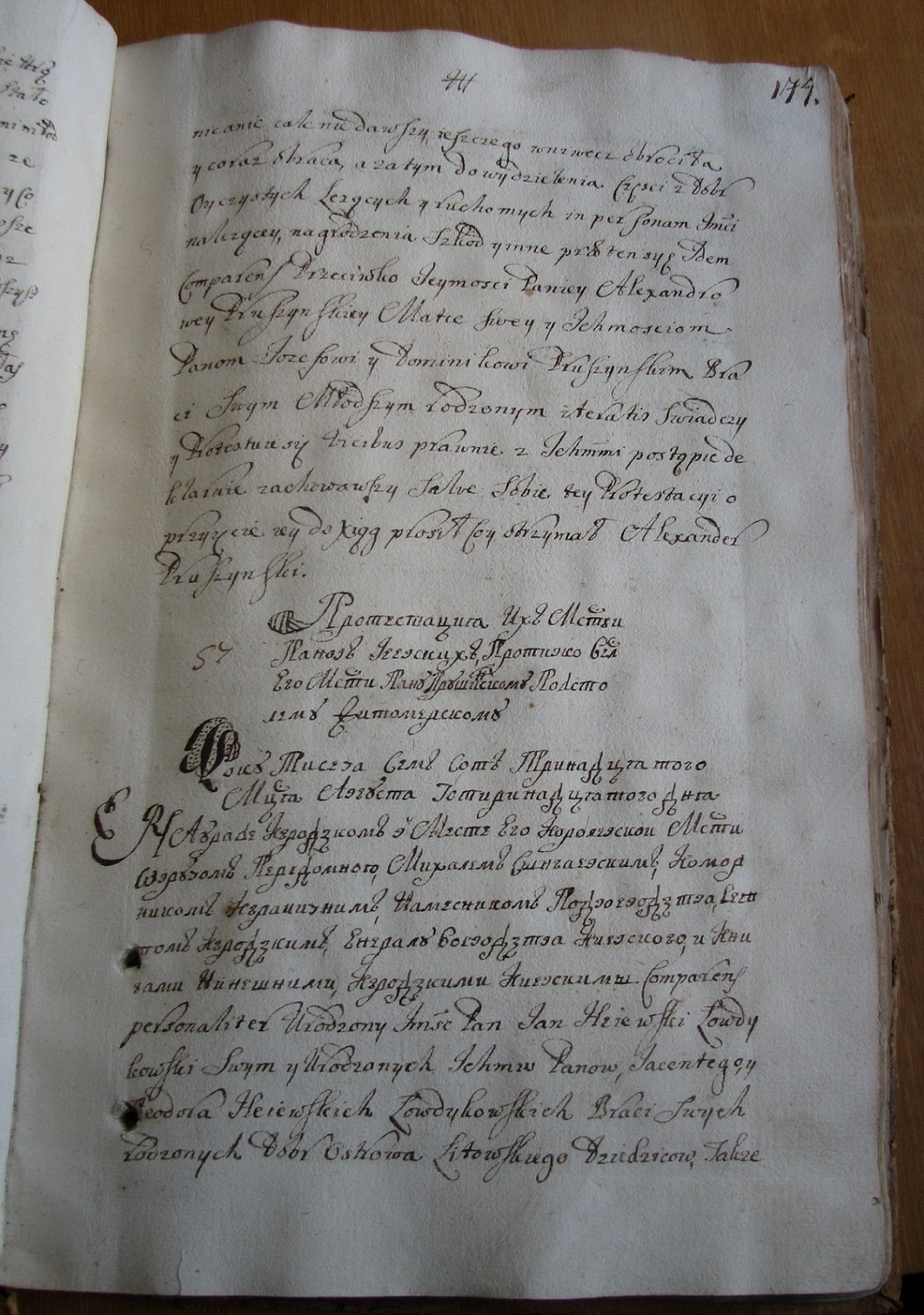 Протестация их милостей панов Геевских против действий пана Прушинского, подстолия Житомирского. Року 1713 месяца Августа 14 дня.